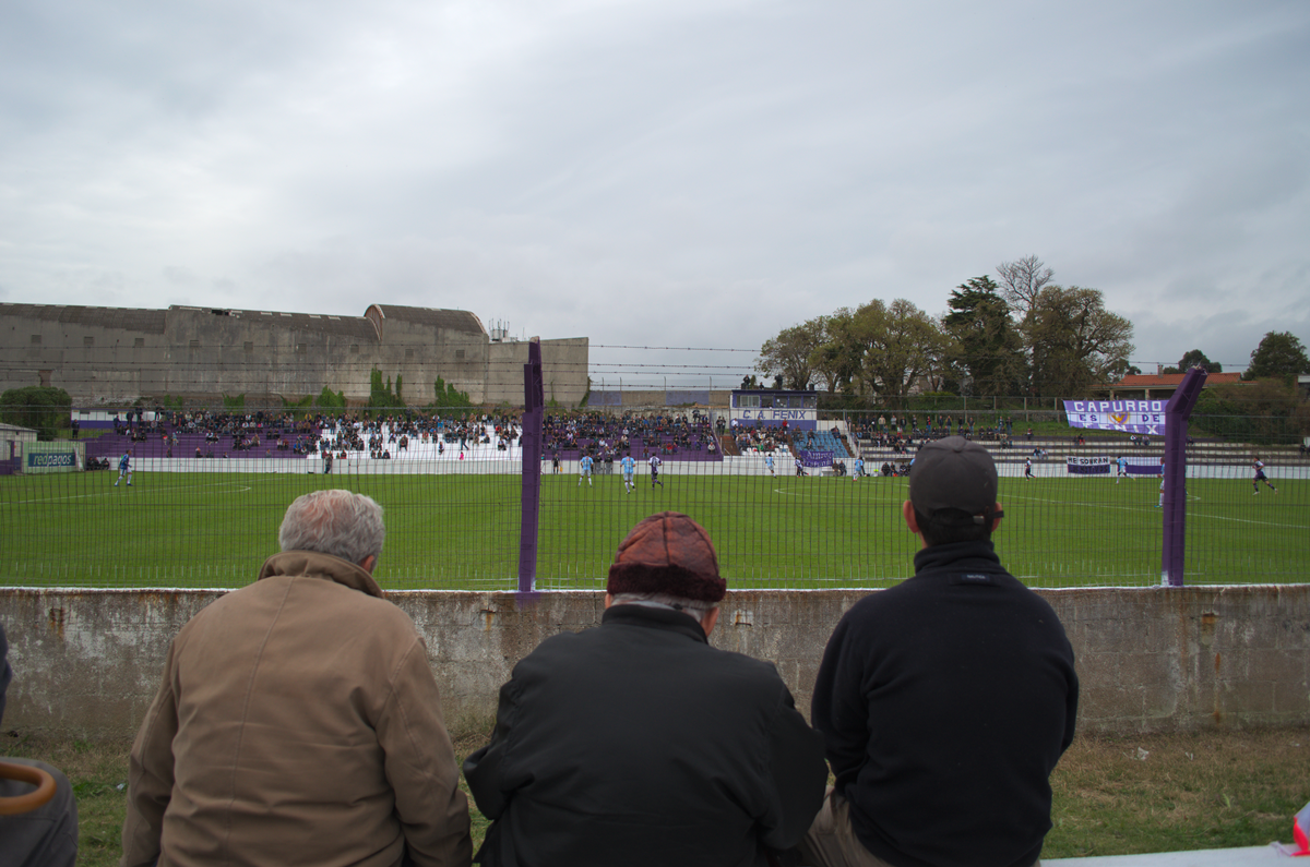 Imagen del Estadio Parque Capurro desde la Tribuna Visitante, en el encuentro entre Fénix y Wanderers disputado por el Torneo Apertura 2012